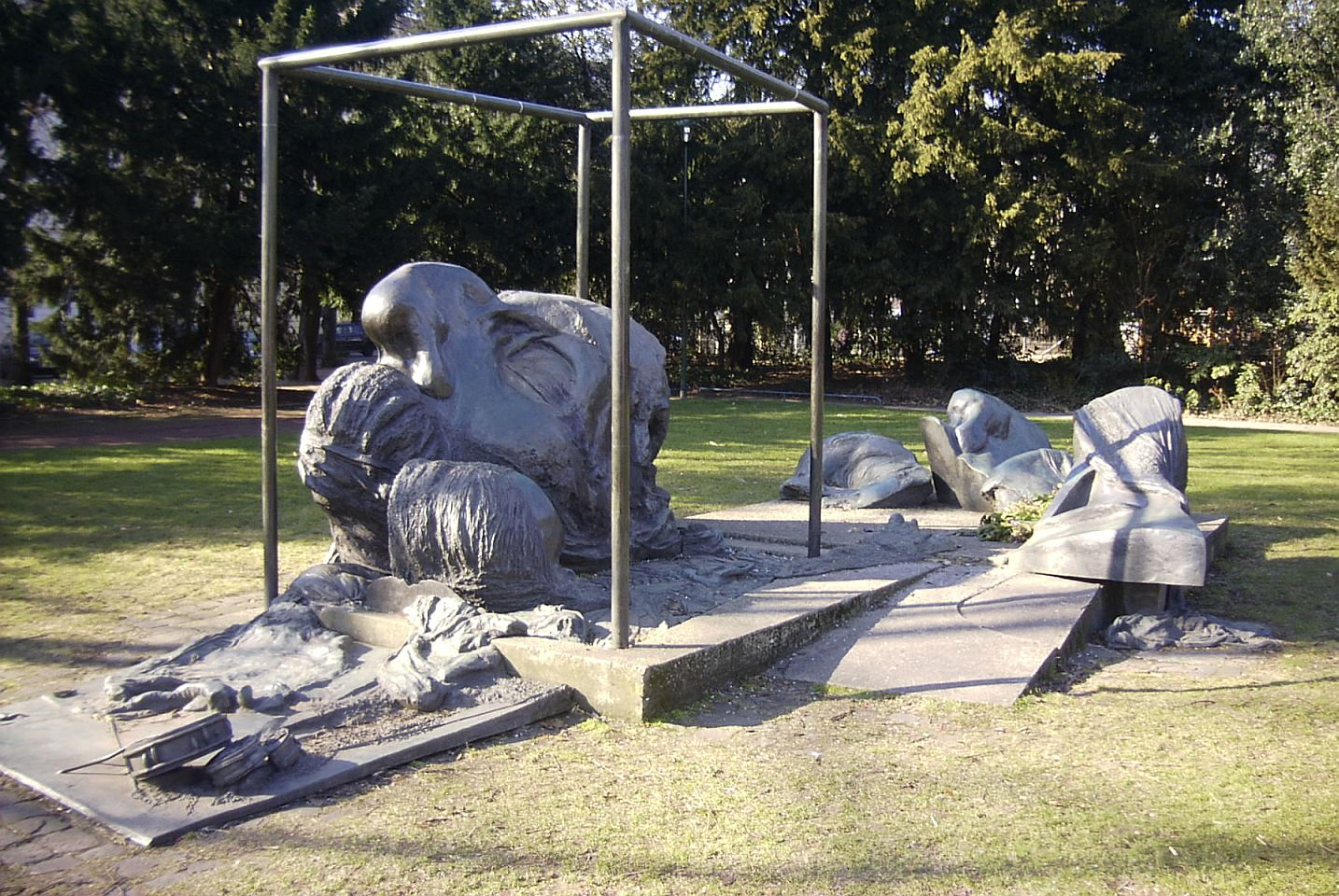 Das Werk besteht aus übergroßen, überzeichneten und auf dem Boden verteilten Bruchstücken der Totenmaske des Dichters, sowie weiteren Gegenständen (z.B. Trommel, Narrenschelle..). Dadurch, dass Gerresheim den Dichter ?vom Sockel? holt, steht der Besucher inmitten einer sogenannten ?Vexierlandschaft?. Das Denkmal thematisiert so das gebrochene Verhältnis der Deutschen zu dem im Pariser Exil verstorbenen Dichter.